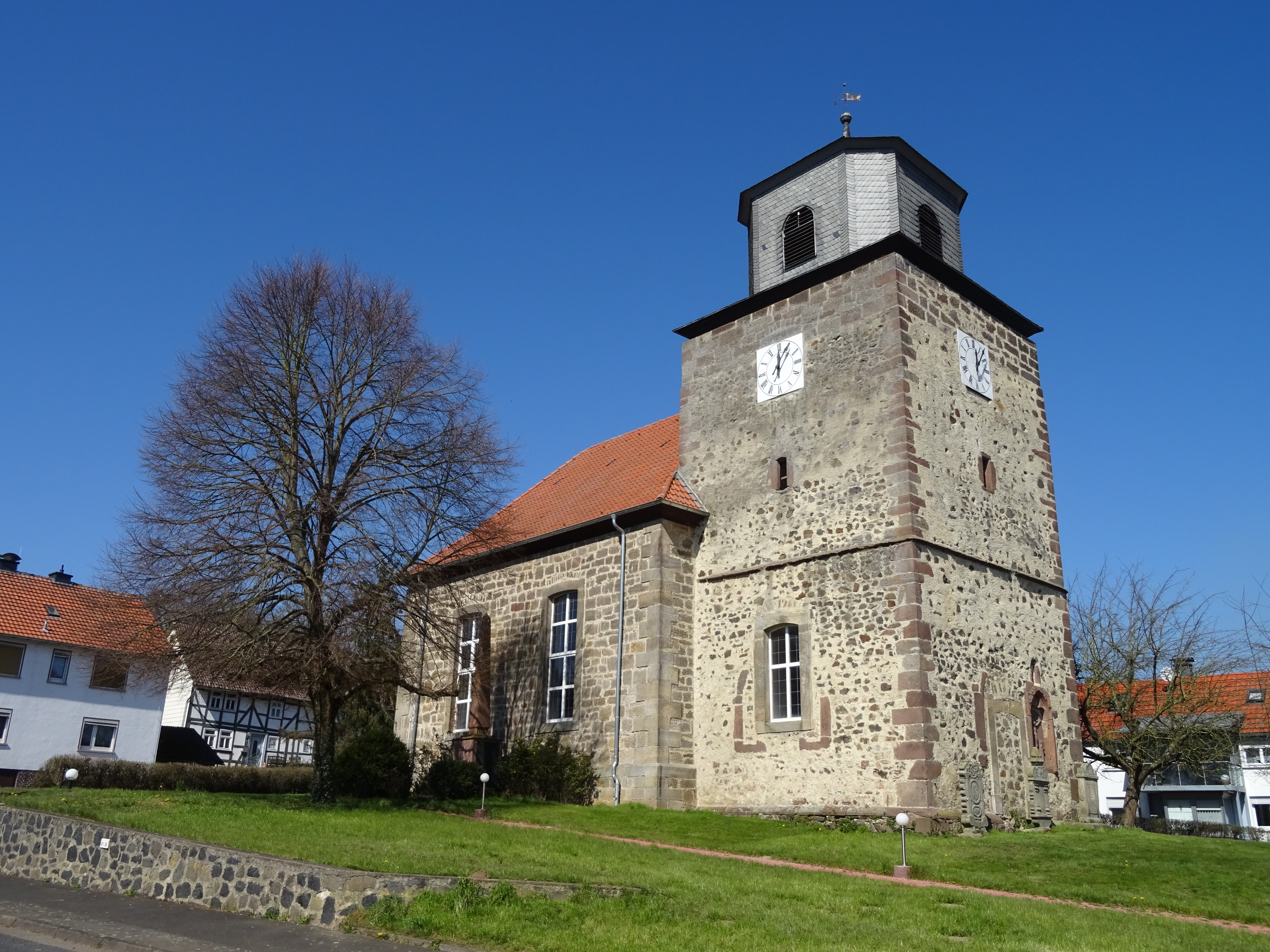 Turmansicht